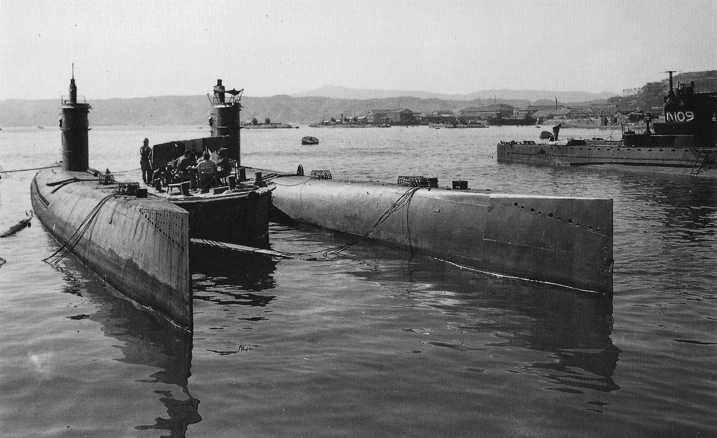 左から波号第204潜水艦、波号第203潜水艦、波号第109潜水艦。呉港。